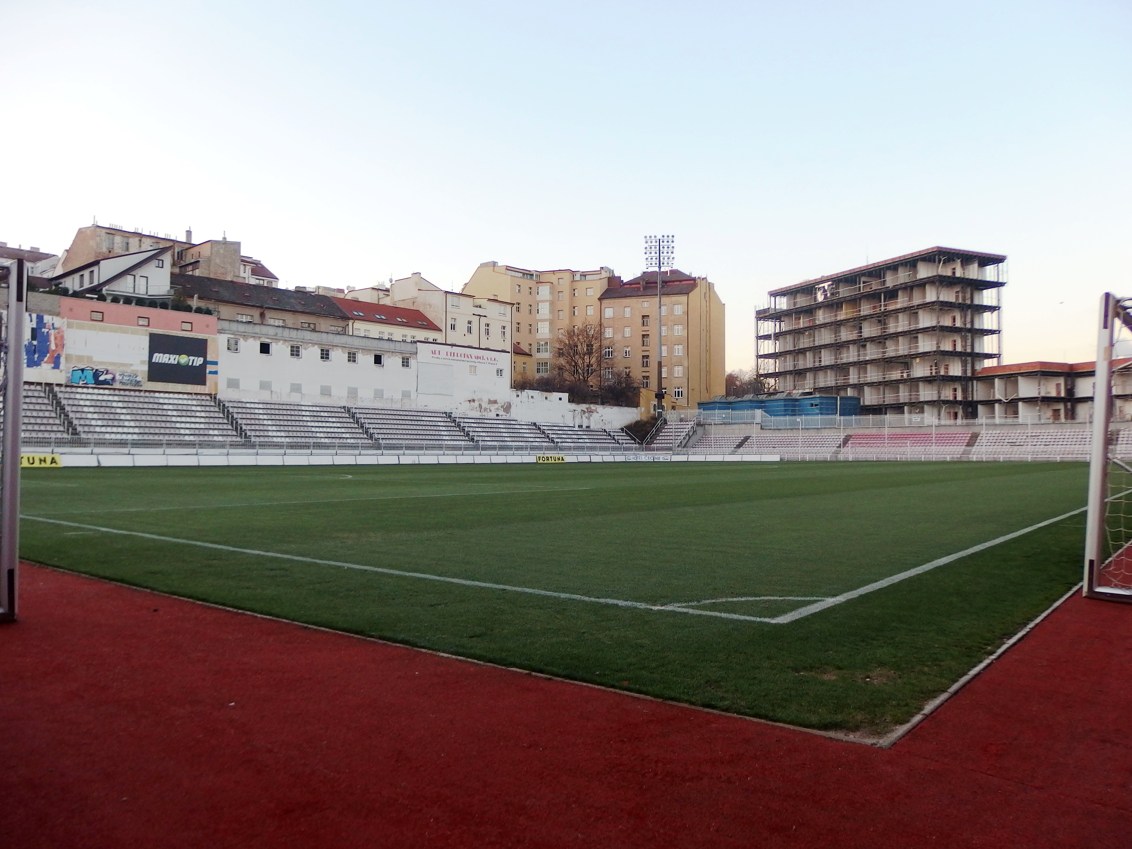 FK VIKTORIA ŽIŽKOV, a.s., fotbalový stadion, Seifertova 2871/10, 130 00 Praha-Žižkov.